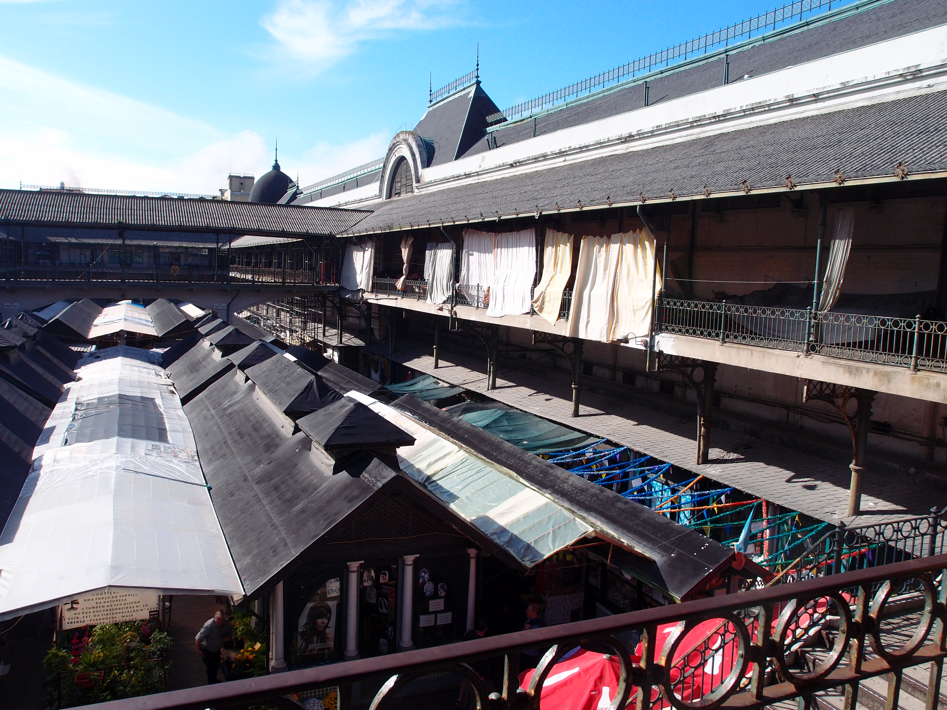 Intérieur du Marché de Bolhao, Porto